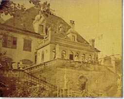 Historisches Kleinbild des Hofguts Georgenau bei (Bad Liebenzell-) Möttlingen